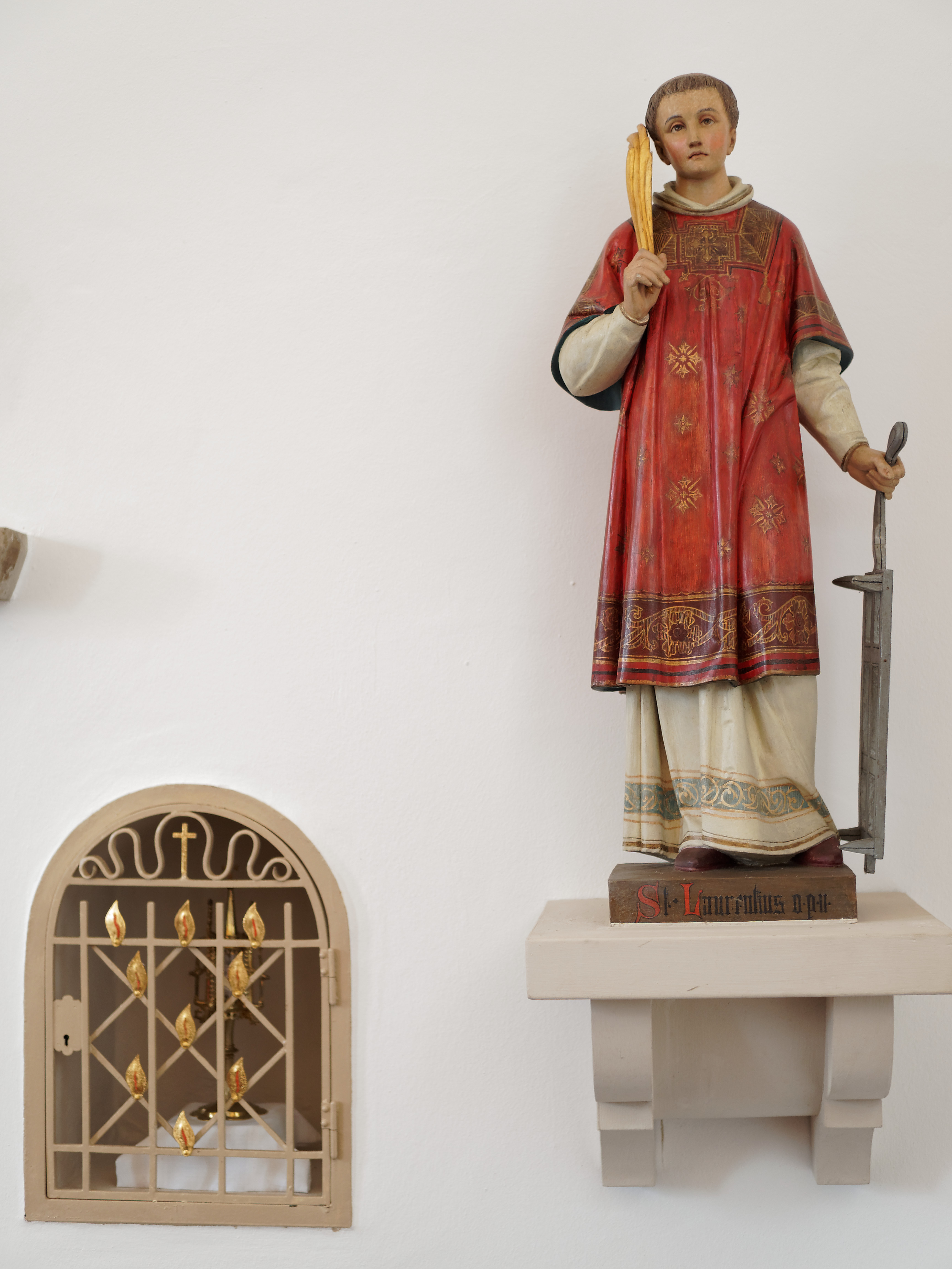 Tag des offenen Denkmals 2017, Statue des Heiligen Laurentius, links der Reliquienschrein in der Kapelle St Laurentius in Waltrop-Leveringhausen, Denkmal aus der Zeit um 1070. Erstmalig 1343 urkundlich erwähnt.